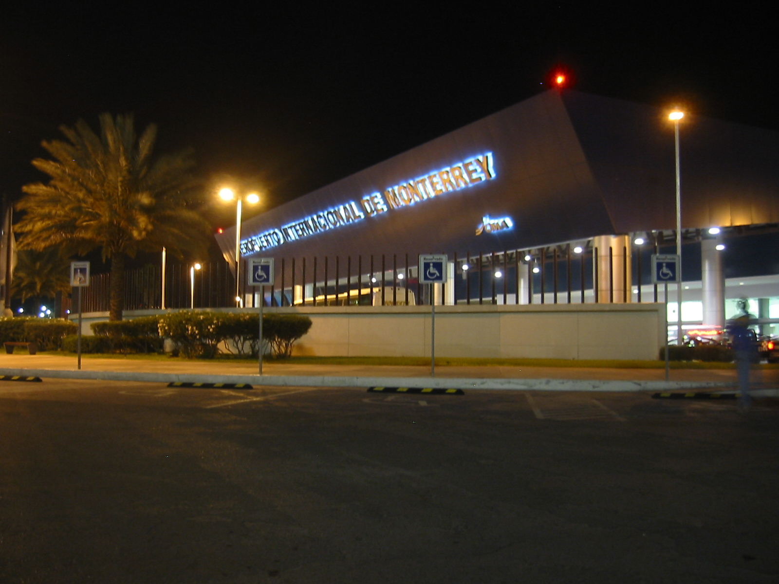 Aereopuerto/Airport Mariano Escobedo en Monterrey, México